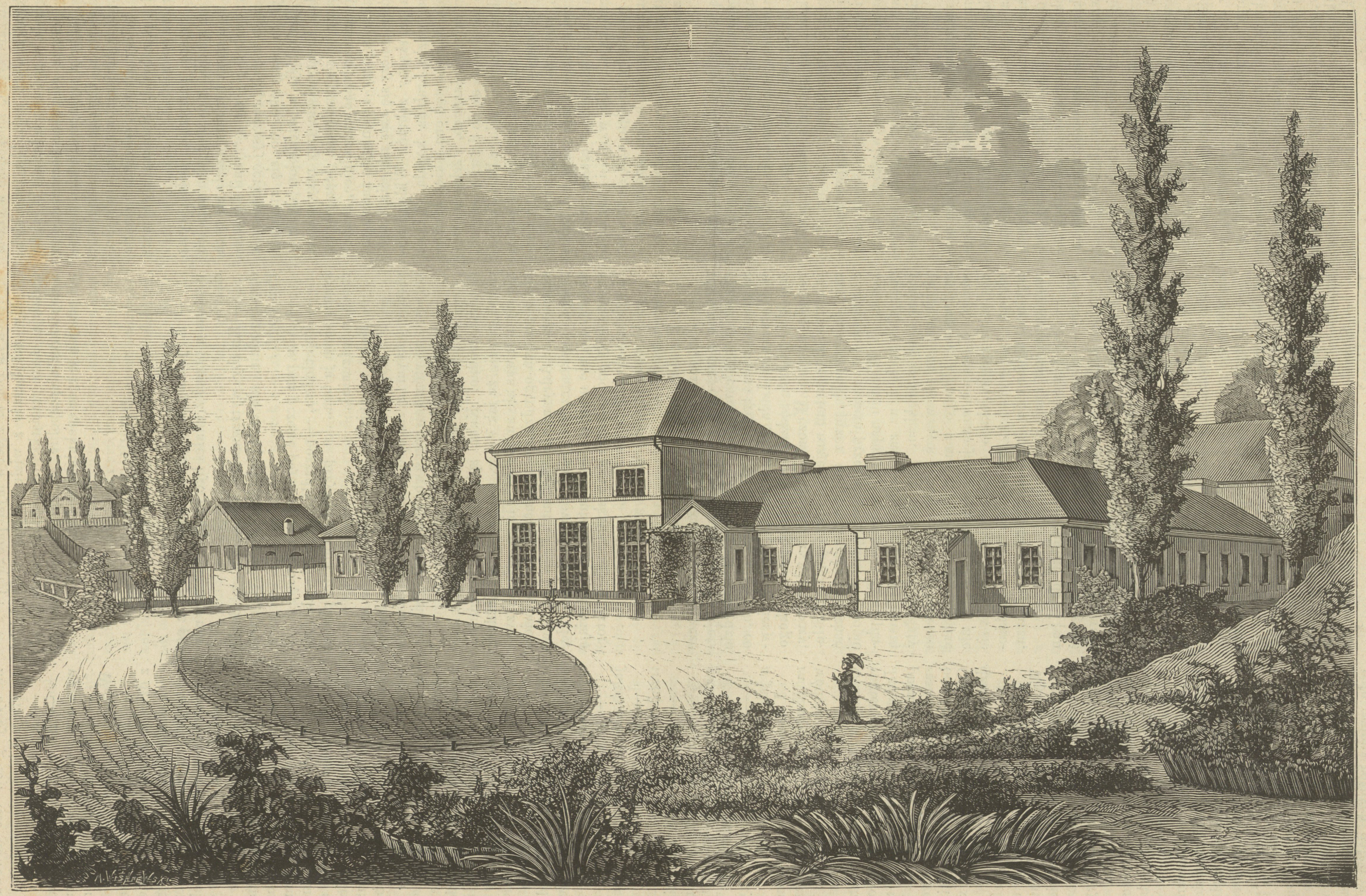 Беларуская (тарашкевіца): Гарадзец (Haradziec), сядзіба Ордаў (Orda)